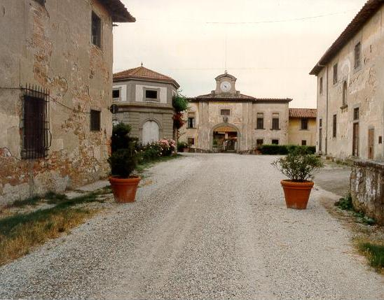 Gli edifici delle Cascine di Tavola